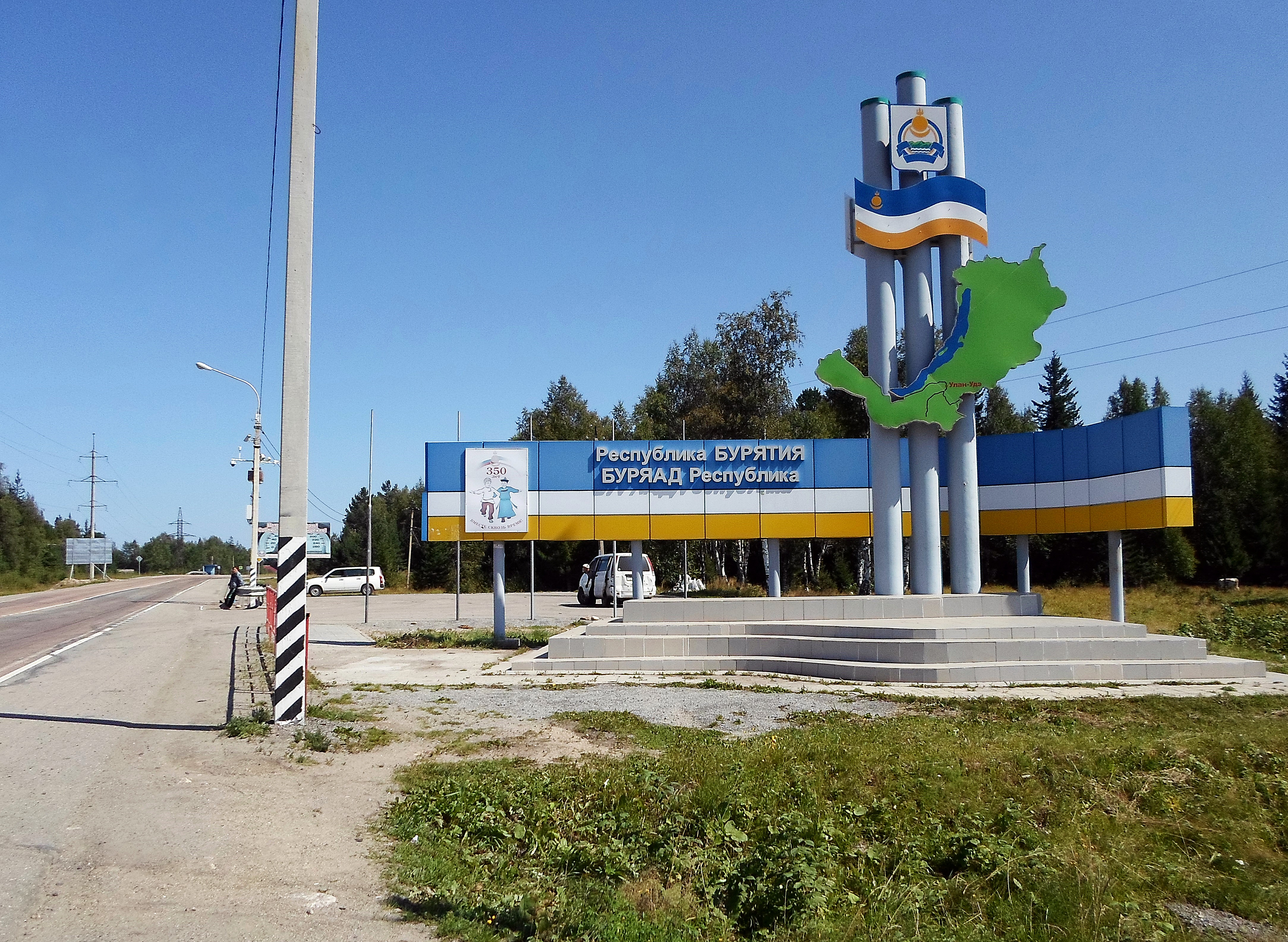 Въезд в Бурятию со стороны Иркутской области. Федеральная автомагистраль Р258 "Байкал" (М55). Посёлок Выдрино Кабанского района.